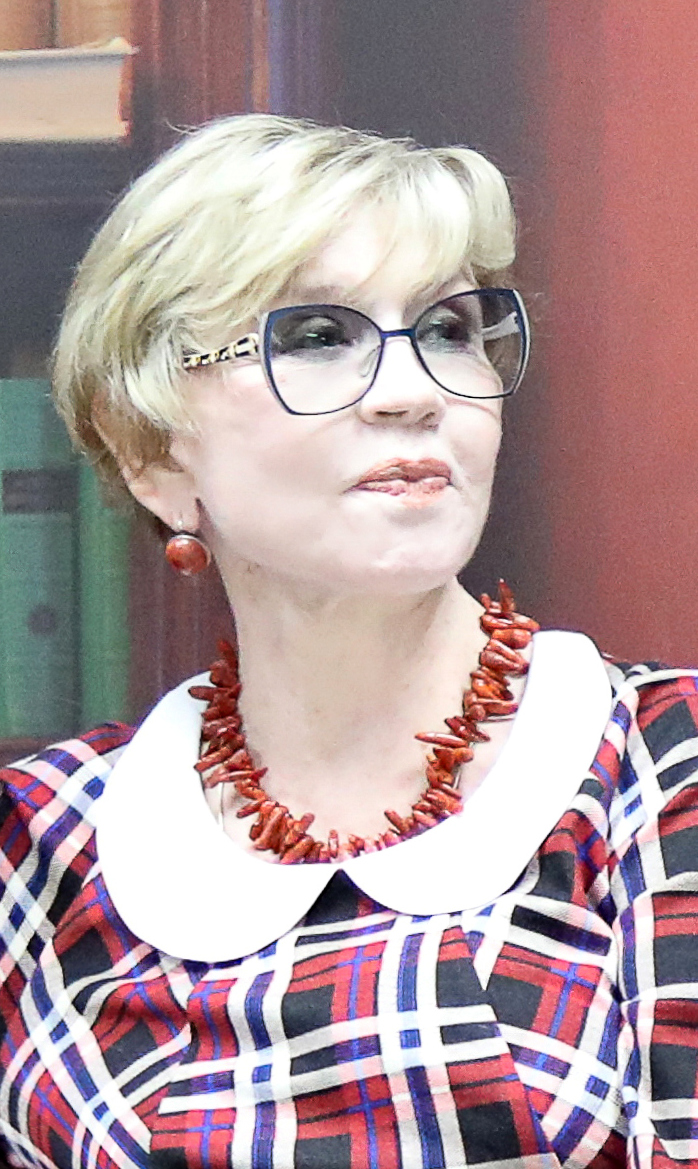 Вера Алентова в Российской государственной детской библиотеке.